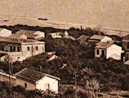 particolare di una cartolina degli anni 30 in cui si vede il campanile della chiesa della Madonna bambina.